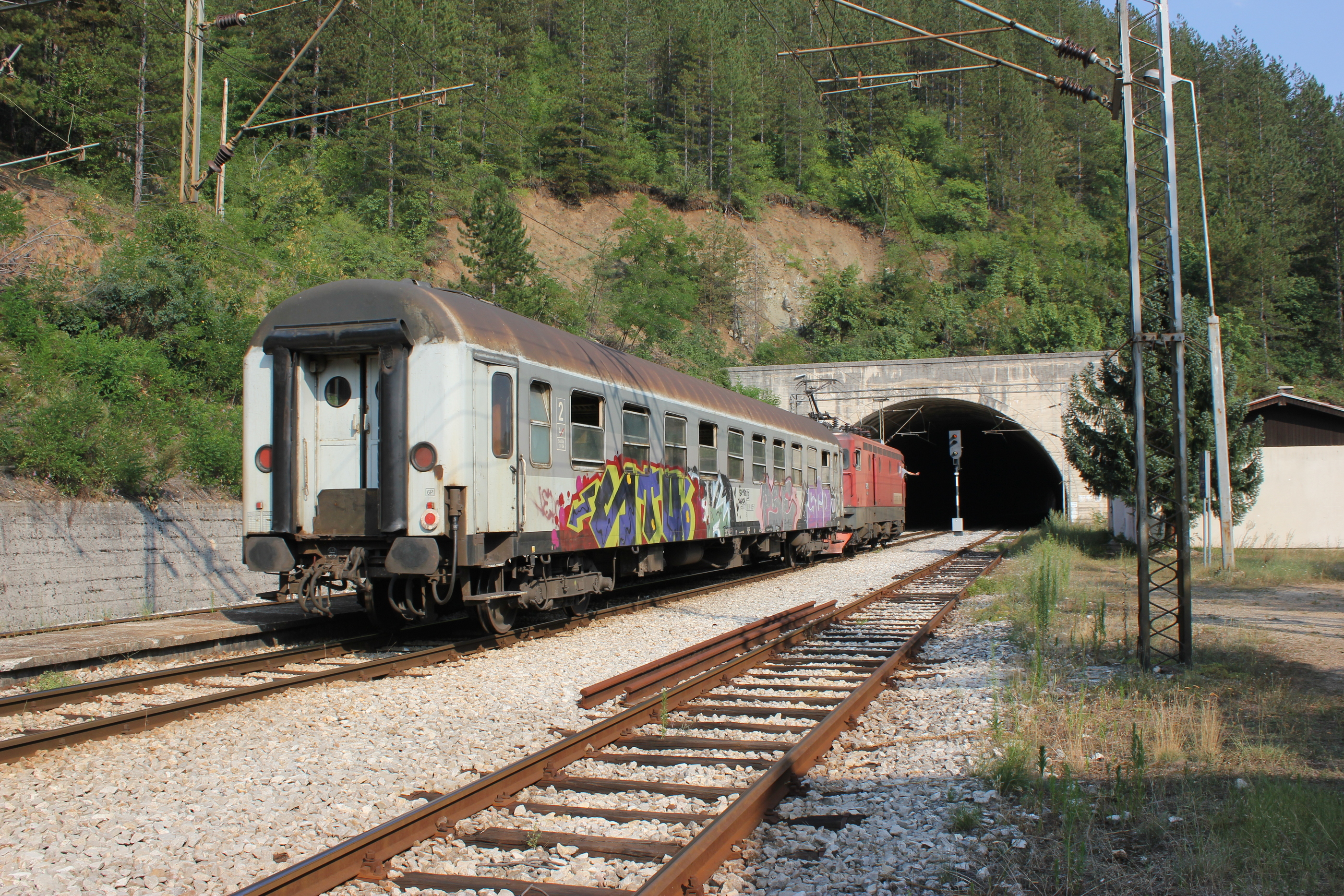 Zug der Linie Belgrad–Bar im Bahnhof von Štrpci, Gemeinde Rudo, Bosnien und Herzegowina.